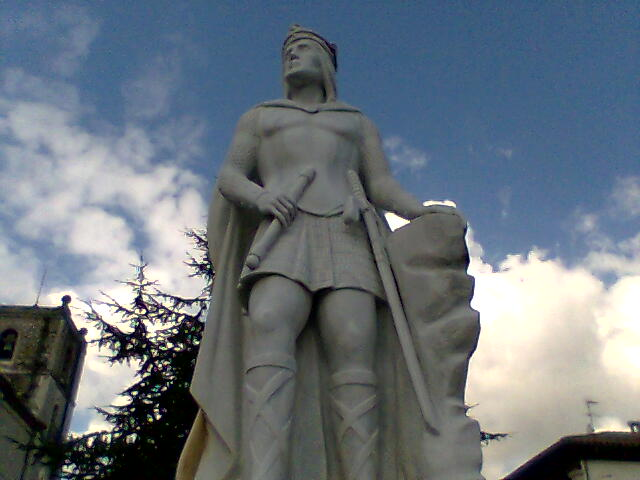 rey silo